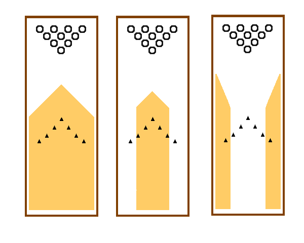 Différente façon de mettre l'huile sur les allées de quille